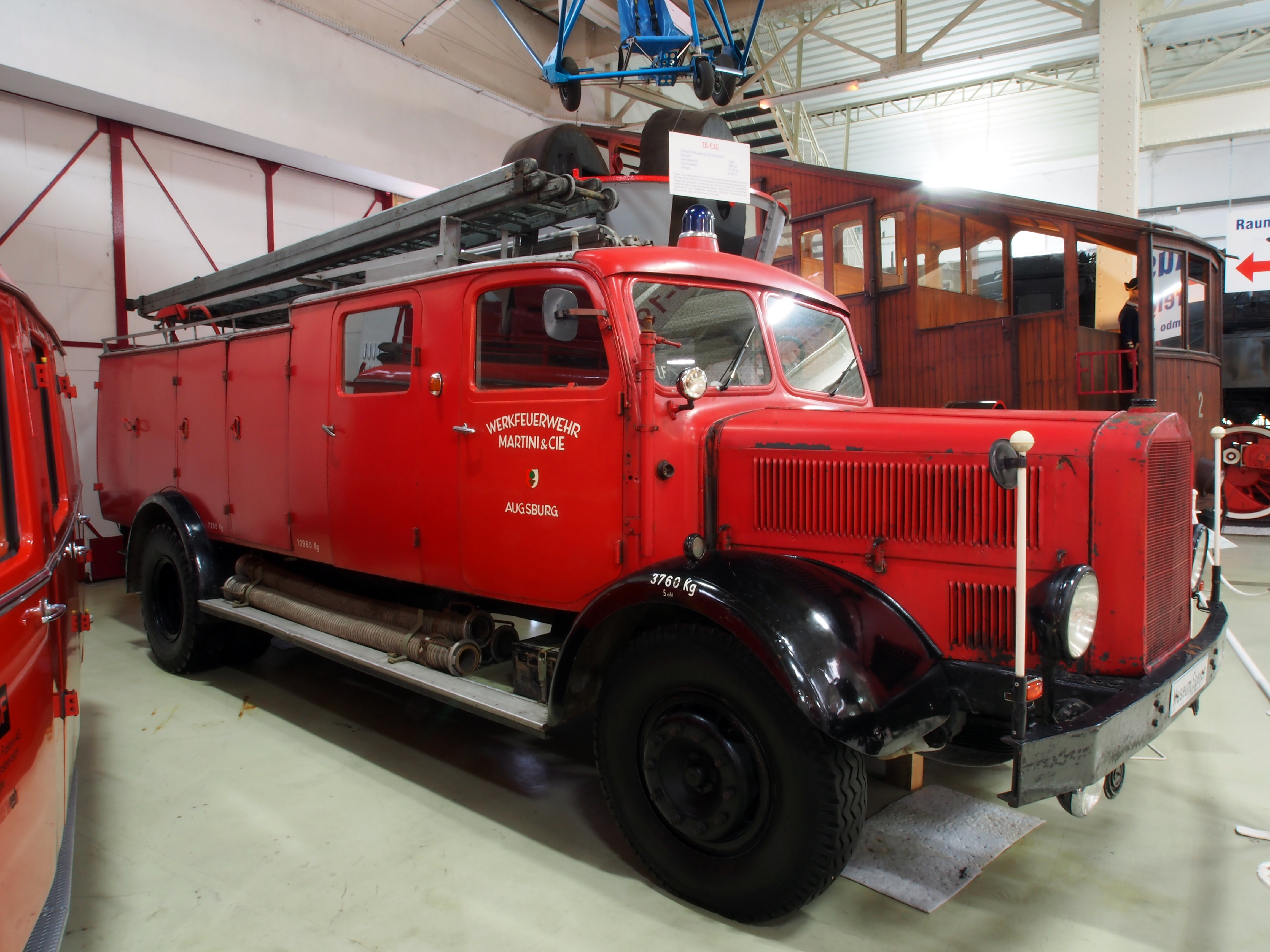 Mercedes-Benz L 4500, Baujahr 1942